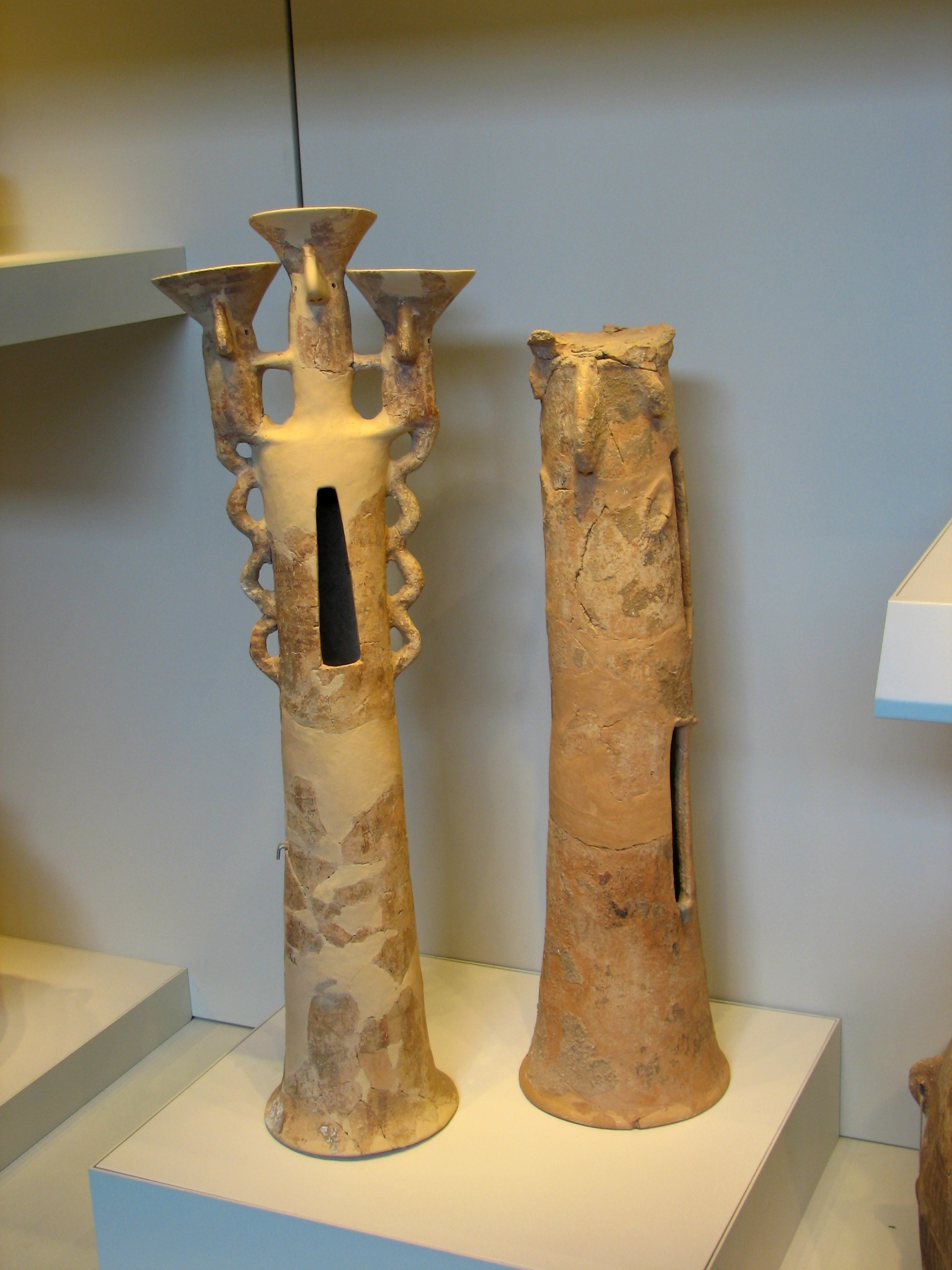 Chalcolithic burial Cave in Peki'in in the Upper Galilee. The cave is narrow 17 m long and 7 m wide with three different levels. it contained many finding including Ossuaries decorated with human faces. Dated 4,500-3,500 BCE מערת קבורה כלקוליתית שנמצאה בשנת 1995 ליד פקיעין. מידות המערה 17 על 7 מטר. יש בה שלושה מפלסים. נמצאו בה כ0 80 גלוסקמאות, כולל גלוסקמאות מחרס מעוטרות בפני אדם, מכלי קבורה וכני קטורת. מתוארכת לשנים 4,500 -3,500 לפני הספירה כני קטורת